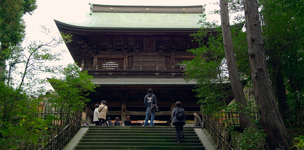 Gate (sanmon) at Engaku-ji in Kamakura, Japan 鎌倉円覚寺の山門